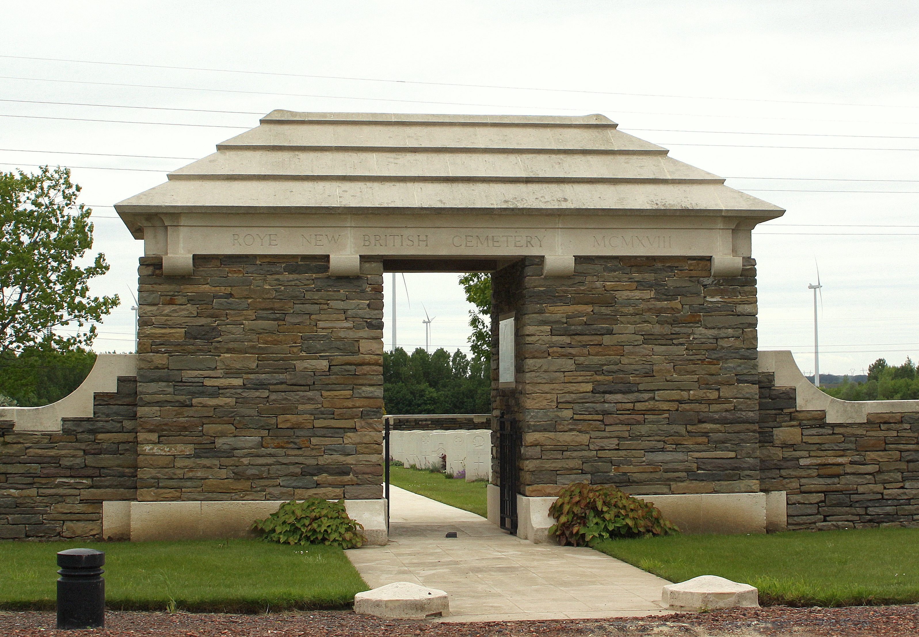 D'entrée vum Roye New British Cemetery laanscht d'D934 tëscht Roye a Roiglise.